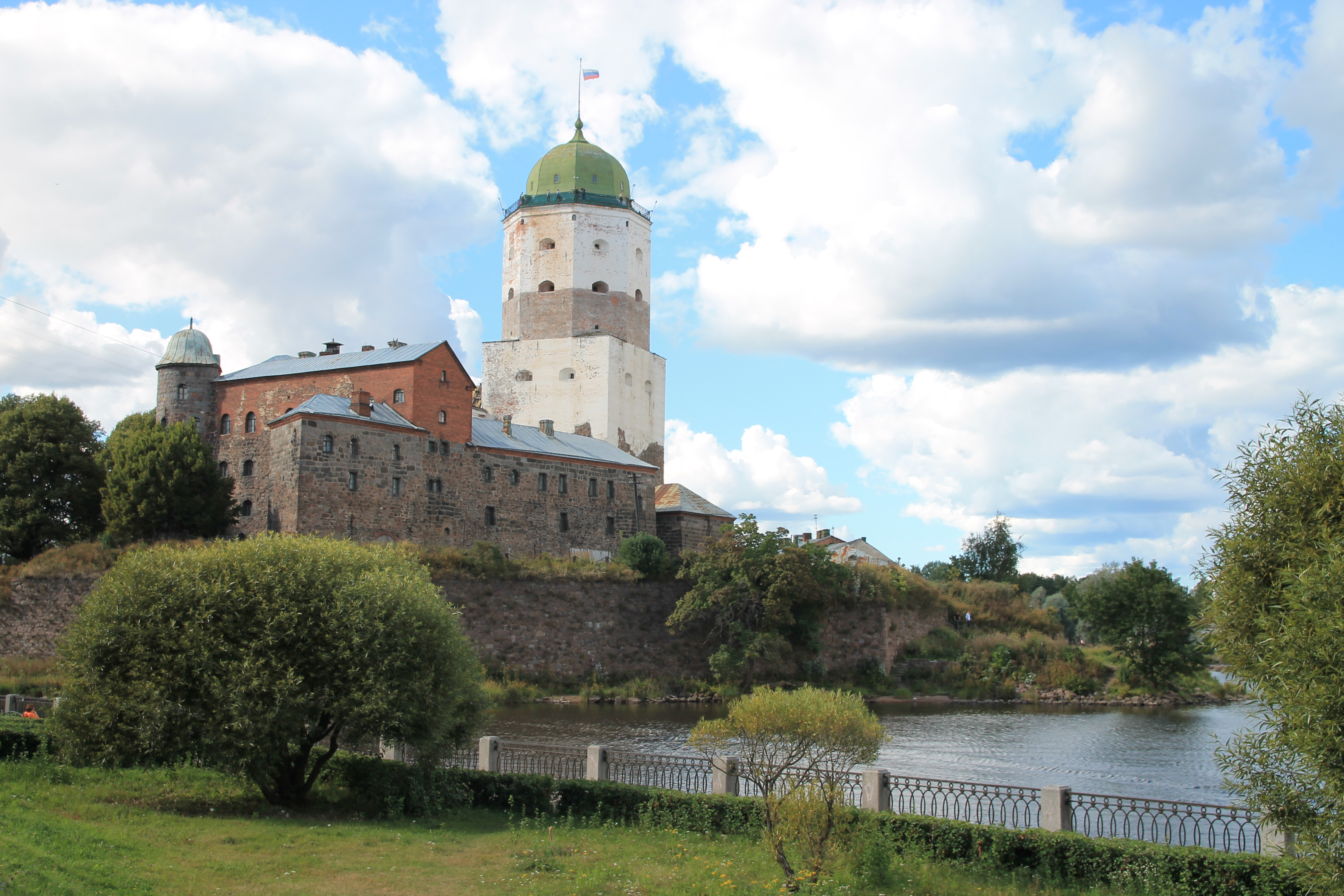 Выборгский замок-крепость (комплекс крепостных построек и сооружений на острове): о. Замковый, Выборг, Выборгский район, Ленинградская область